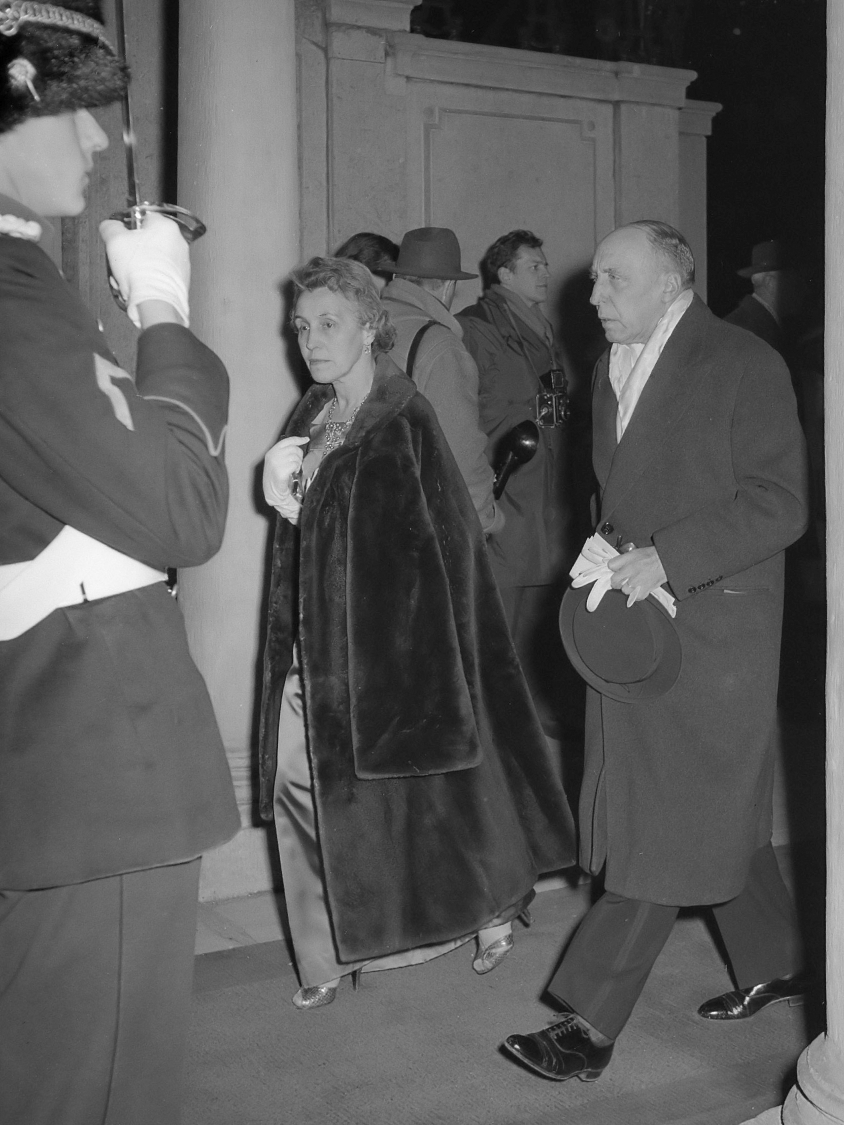 Diplomatendiner op Huis ten Bosch , Portugese ambassadeu dr. J. de Barros Ferreira da Fonseca 25 januari 1961